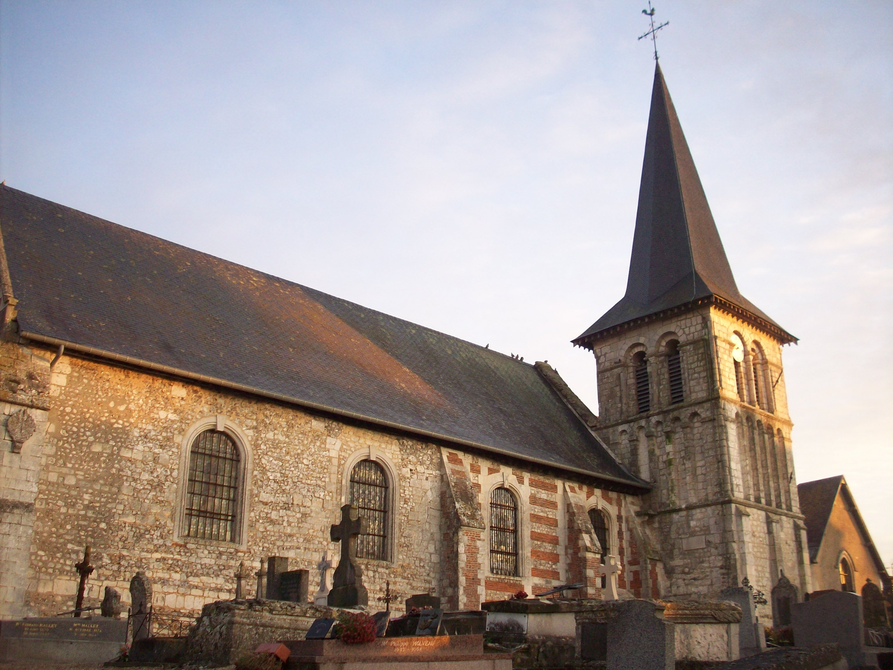 Église Notre-Dame de Brestot.